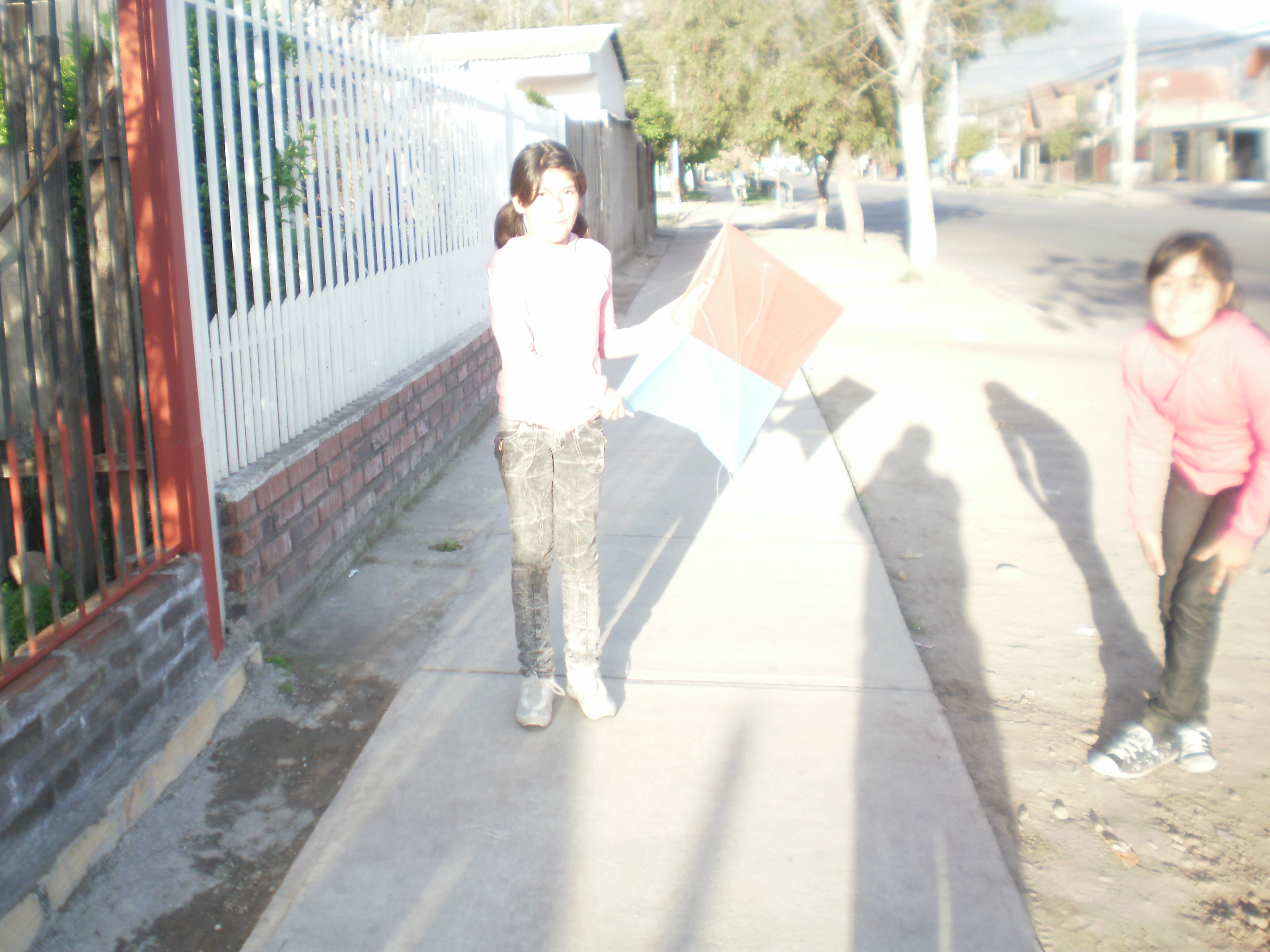 Niñas chilenas muestran volantín cortado atrapado.